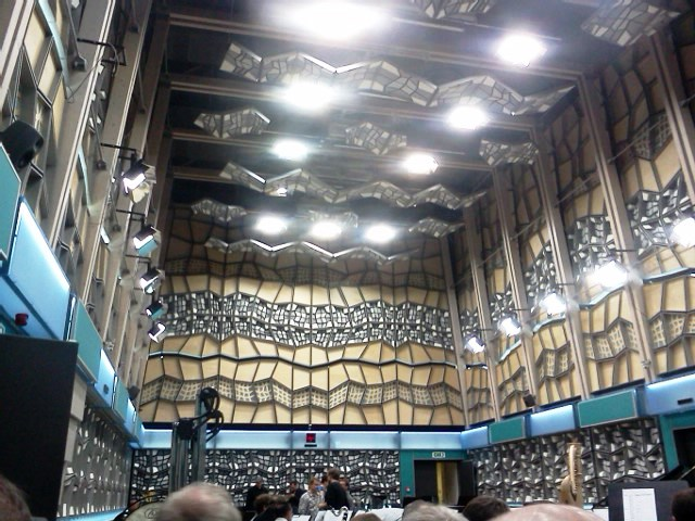 Zkušebna orchestru Českého rozhlasu